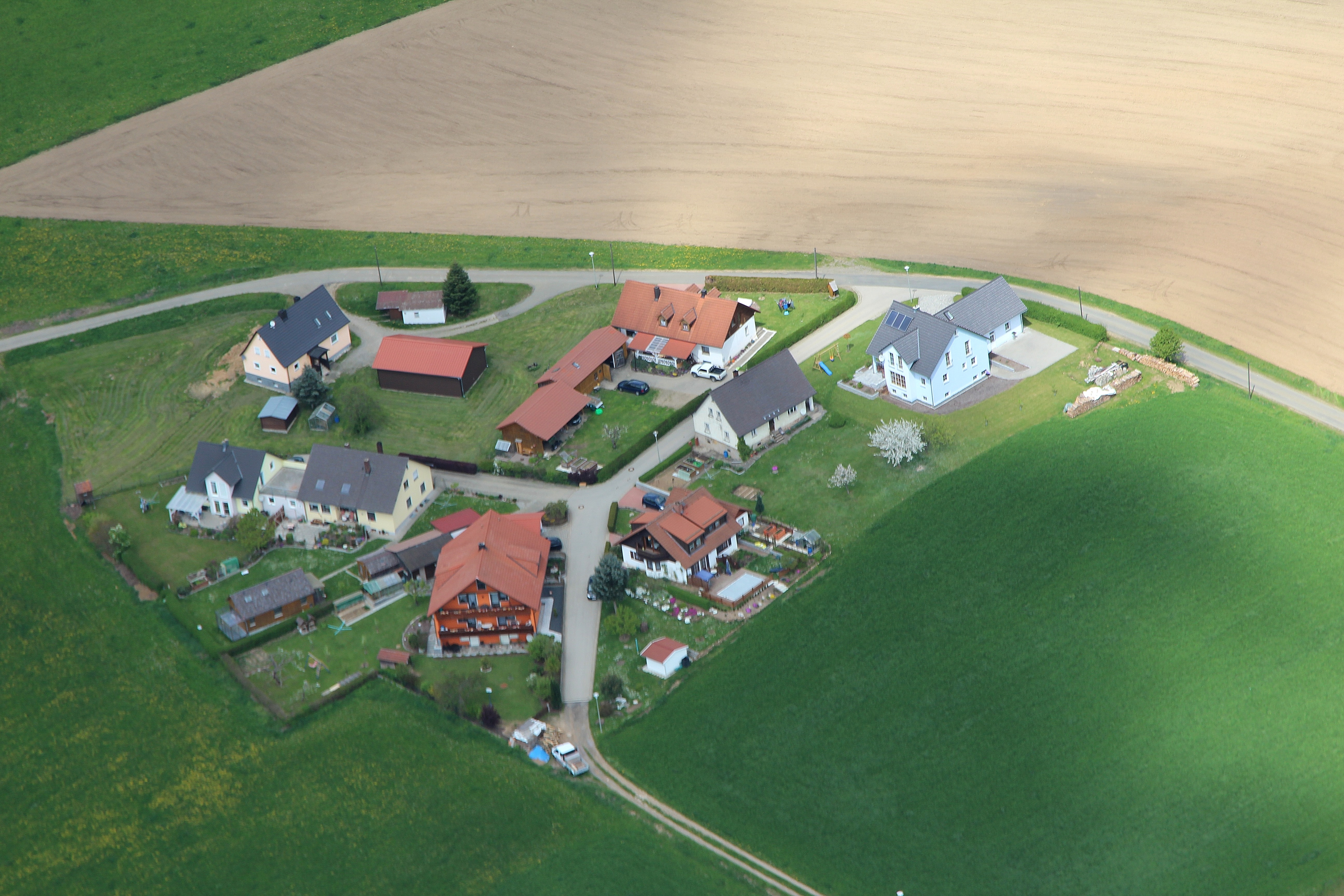 Zieglhäuser, Gemeinde Gleiritsch, Landkreis Schwandorf, Oberpfalz, Bayern (2015)